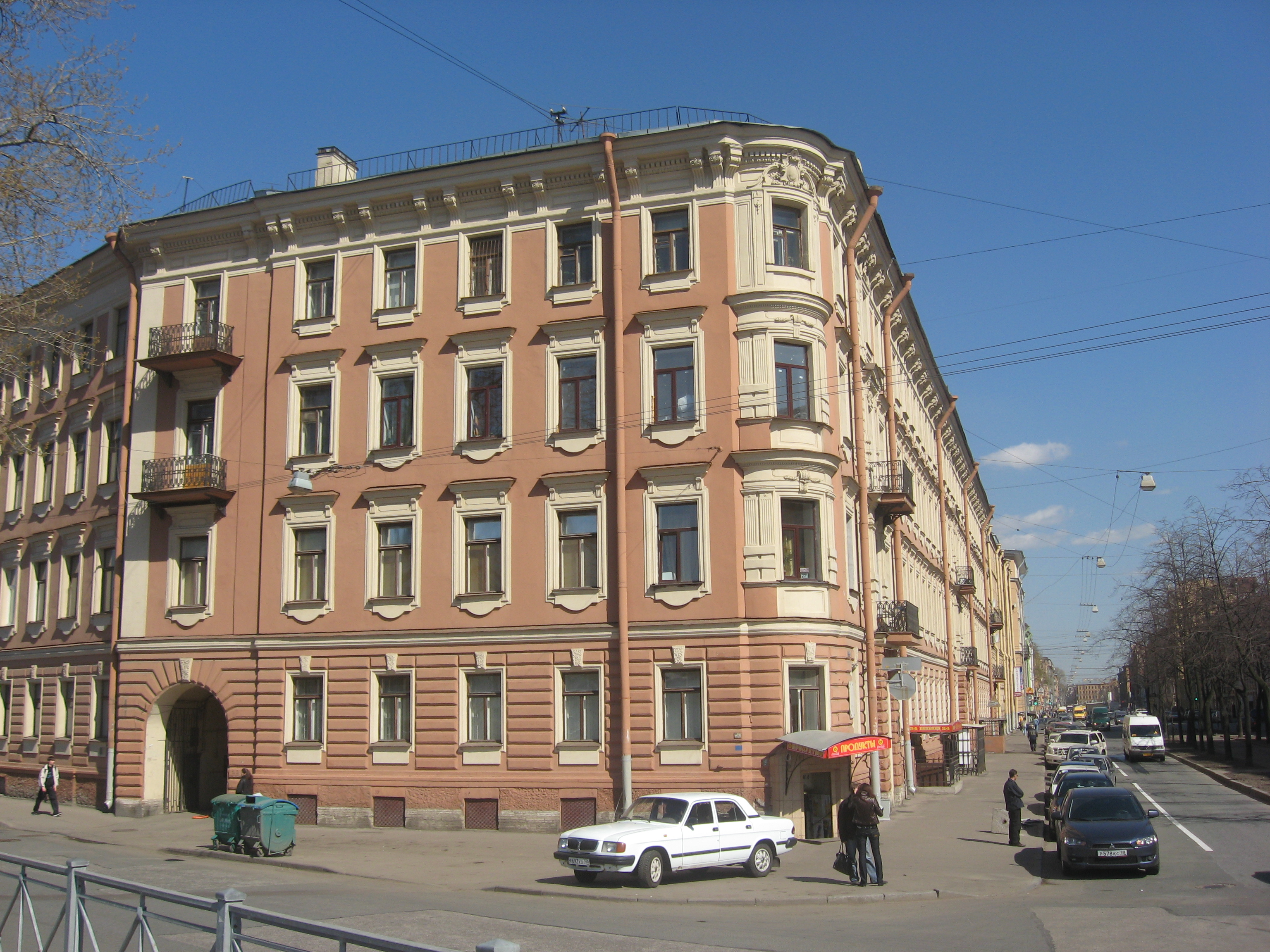 Blok Museum in Saint-Petersbur